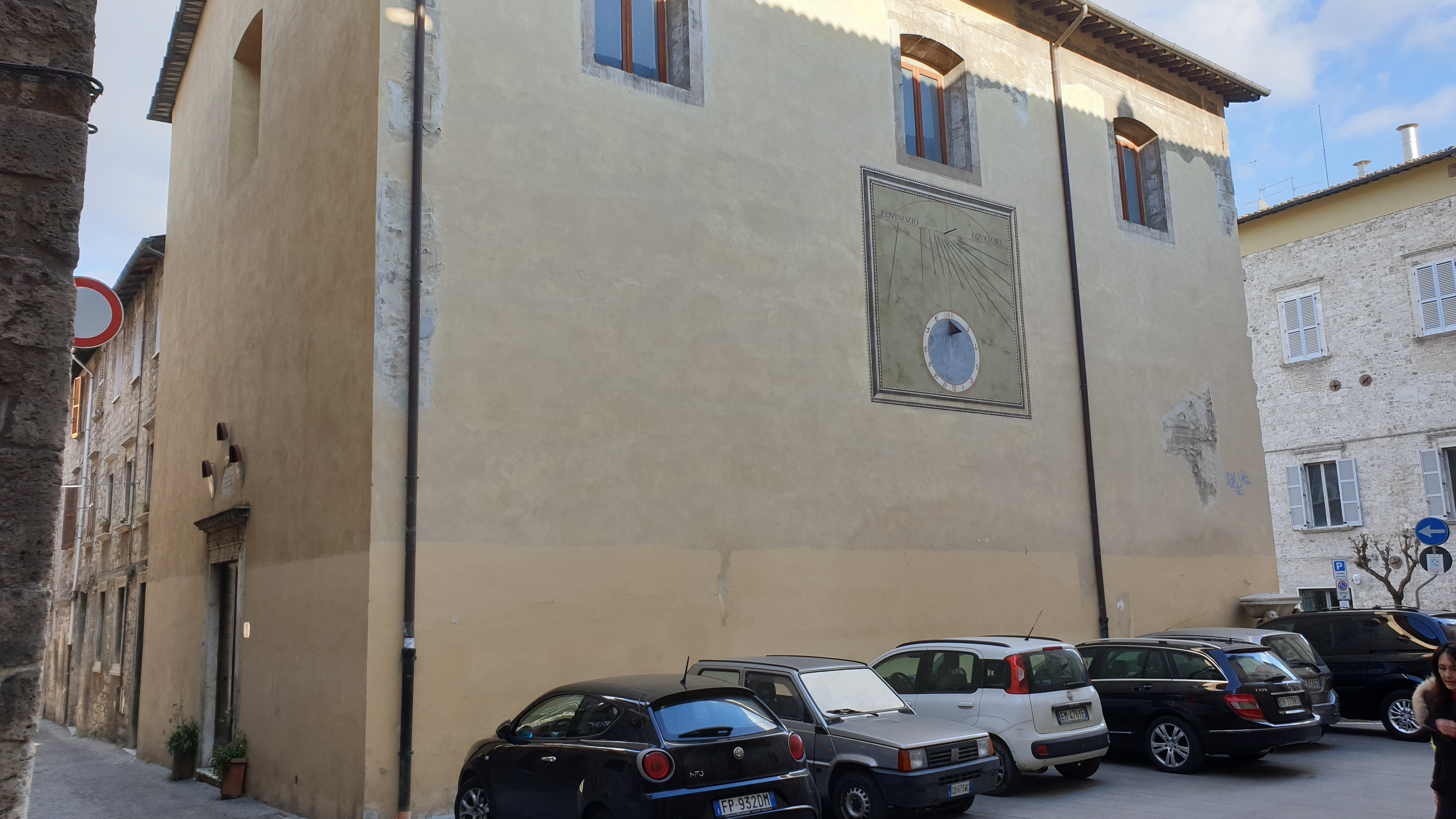 Ascoli Piceno: Chiesa di San Cristoforo